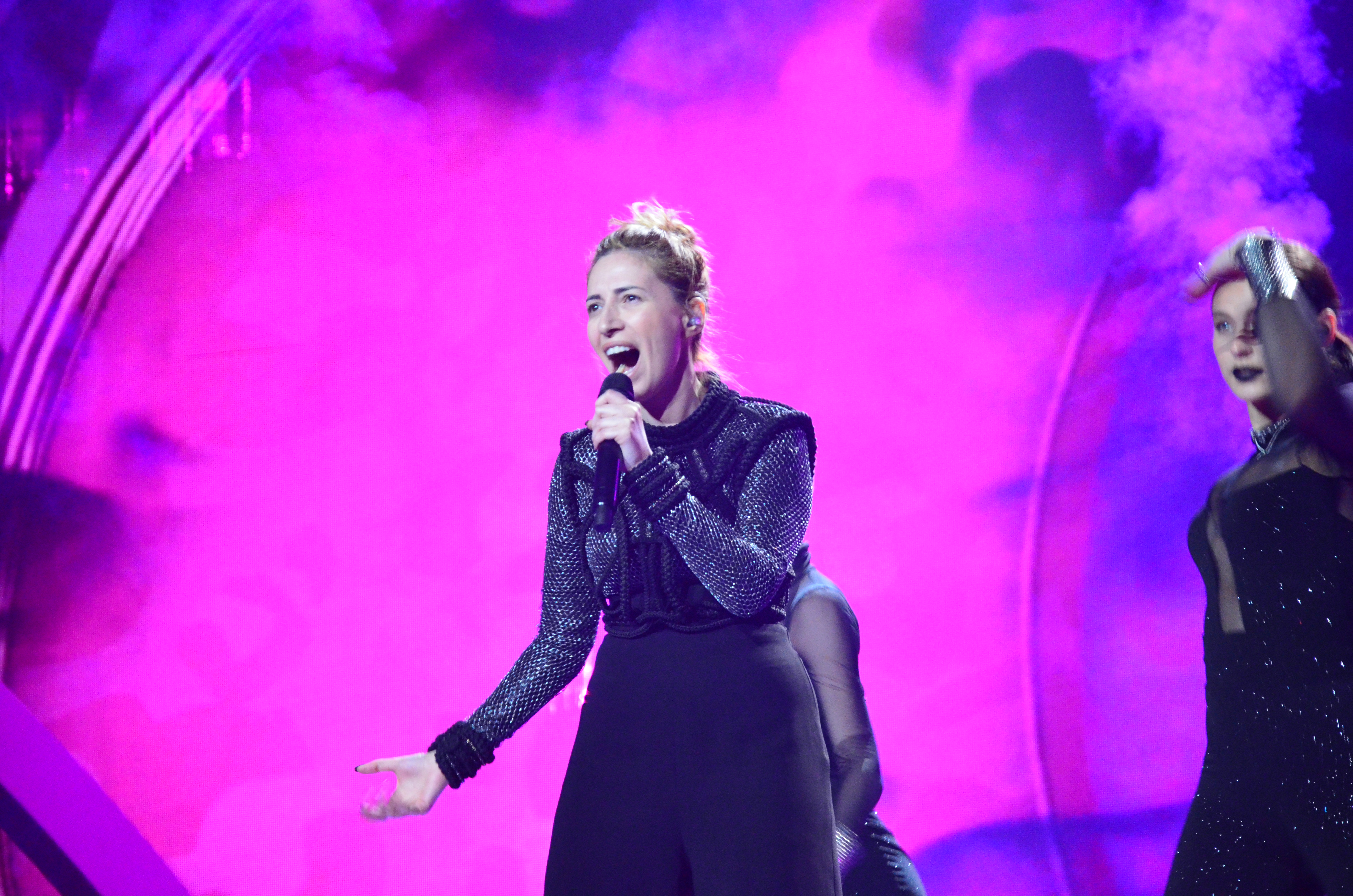 12 травня. Генеральна репетиція фіналу Євробачення 2017. Artsvik (Armenia).